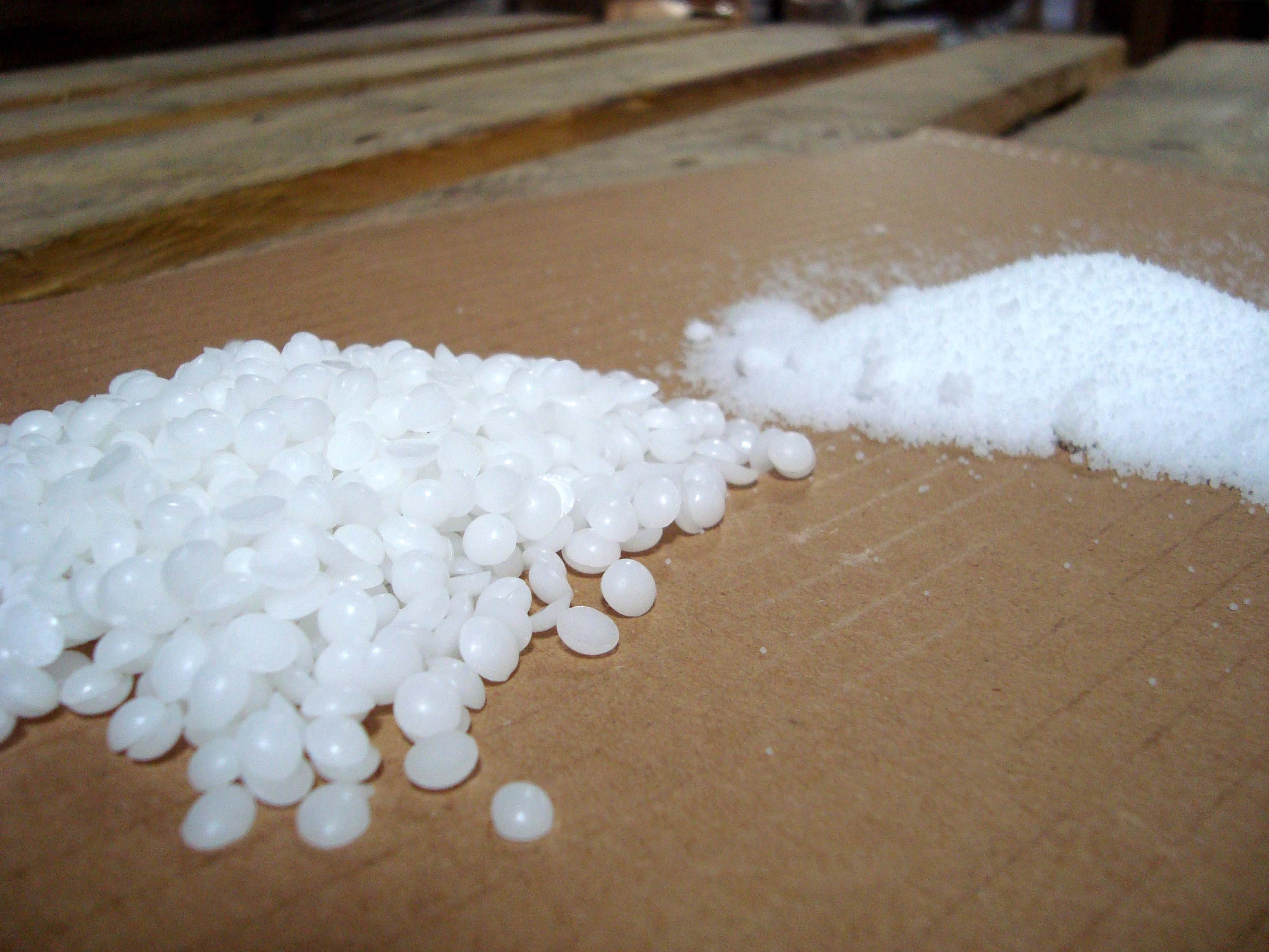 Parafín čočky a prach - granulované formy parafínu v pytlech